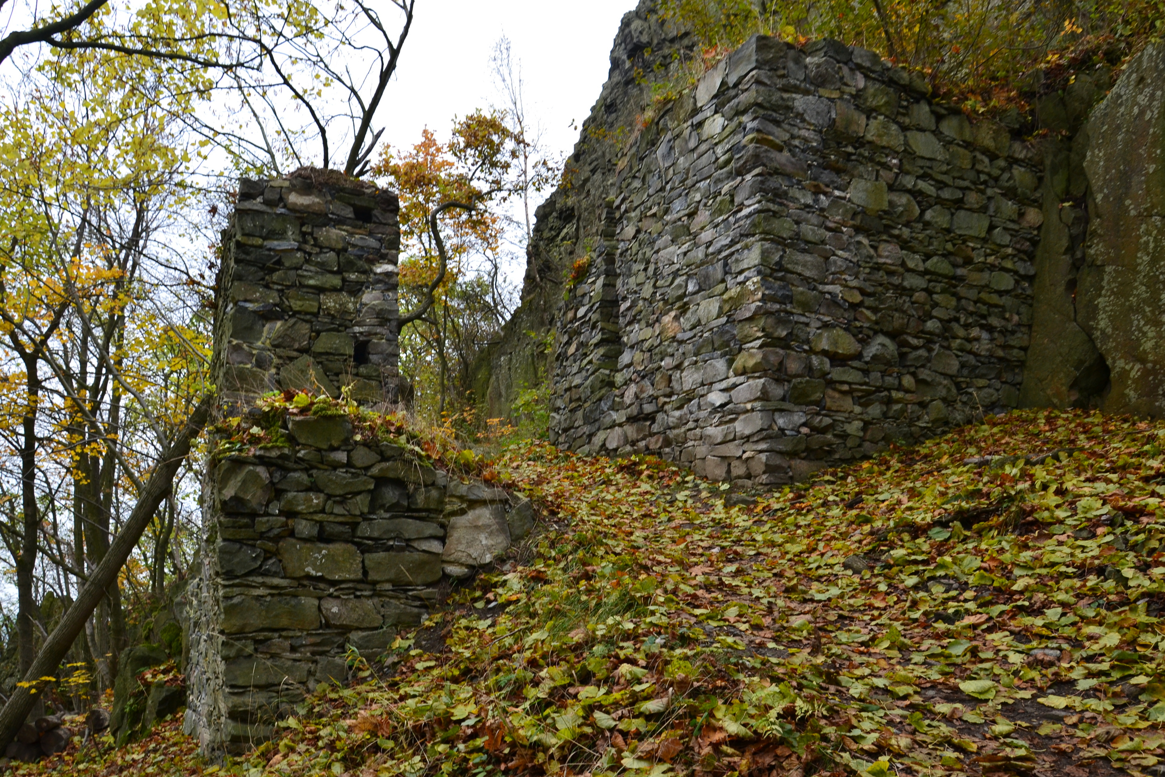 Oltářík – zřícenina druhé brány